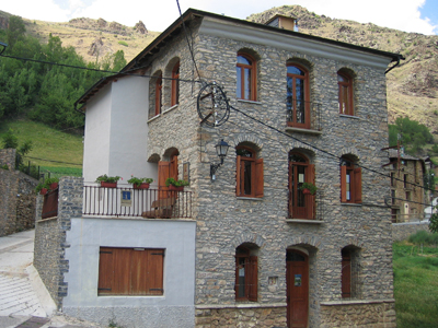 Edifici del Museu del pastor a Llessui, Pallars Sobirà, Lleida, Catalunya.